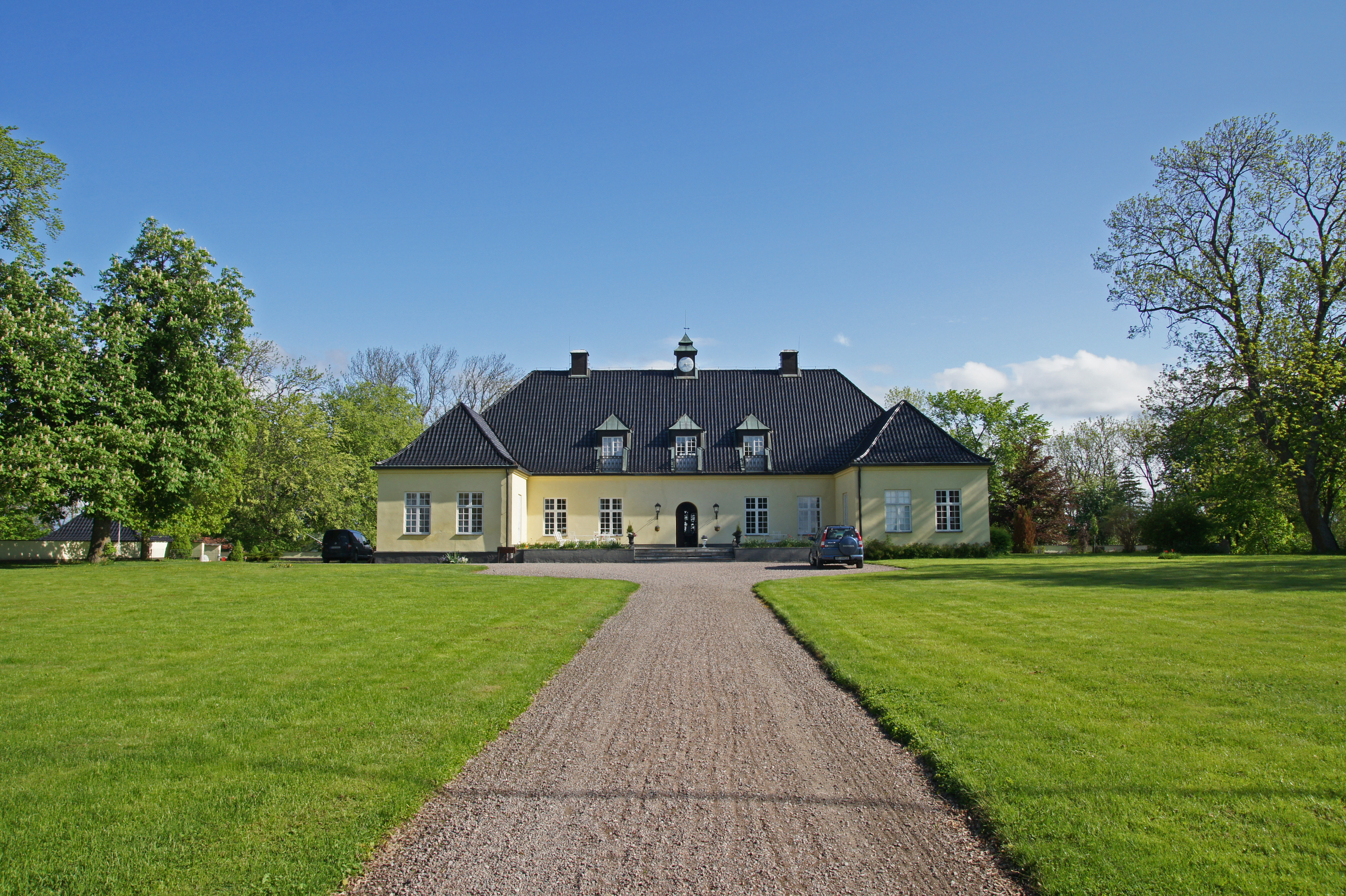 Idingstad Sateri